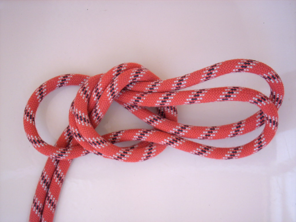 Doppelte Rettungssschlinge, Bucht über Knoten gestülpt